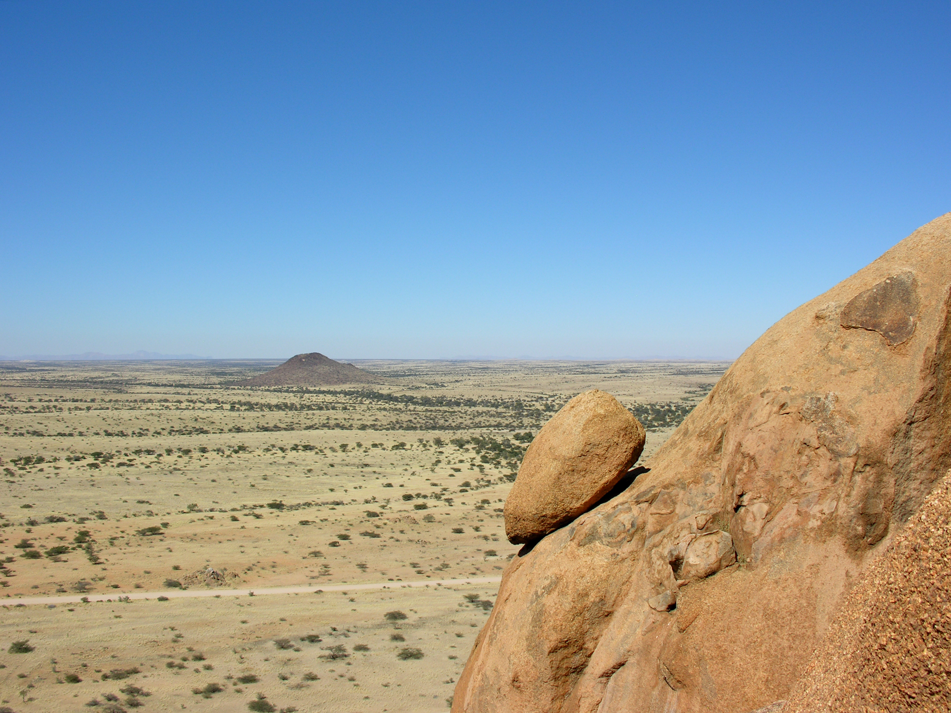 Namibia, Spitzkoppe Namibia, Bushman's Paradise at Spitzkoppe